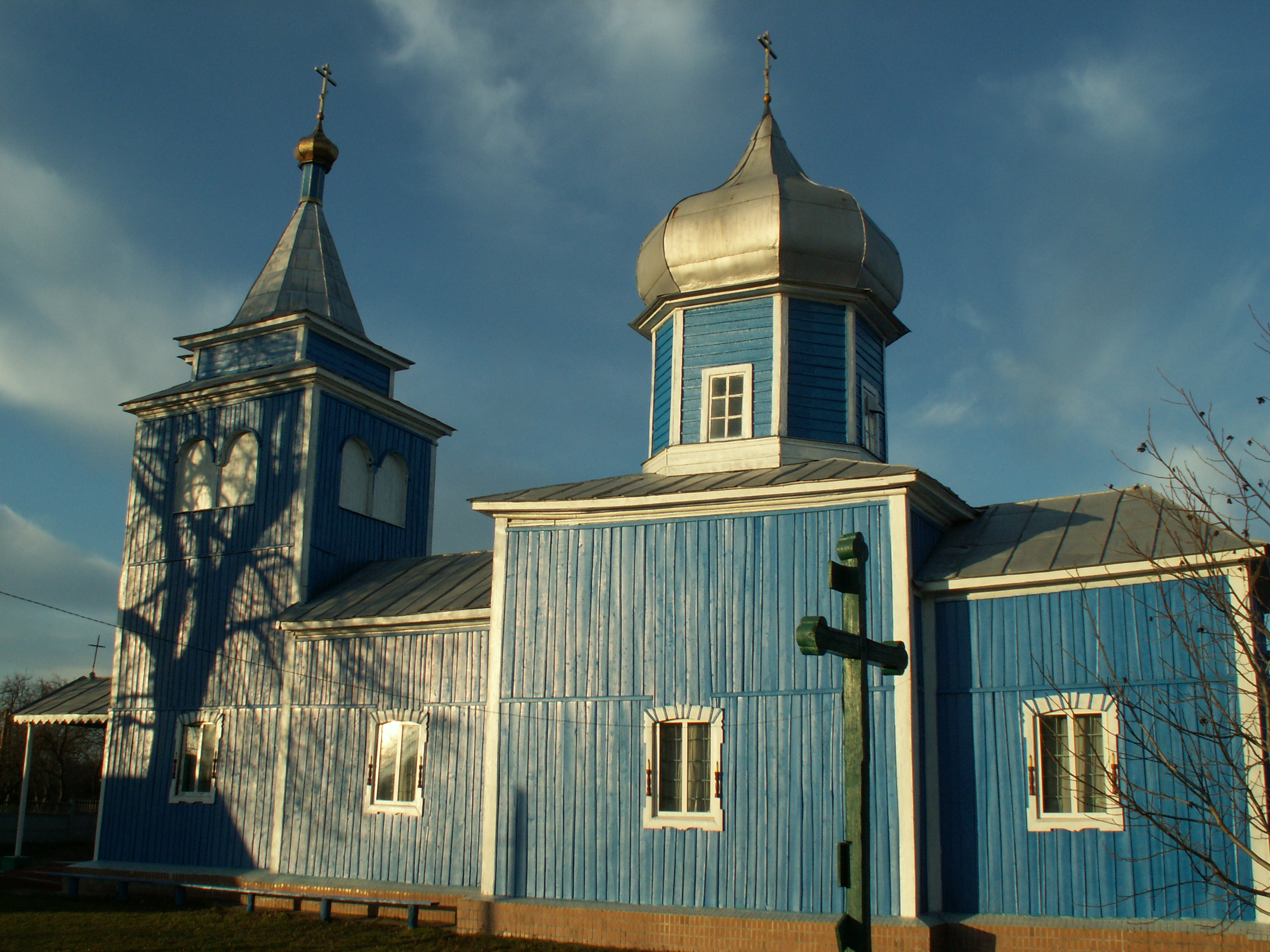 Свято-Покровська церква у Пиляві - одне з "Семи чудес Тиврівщини"